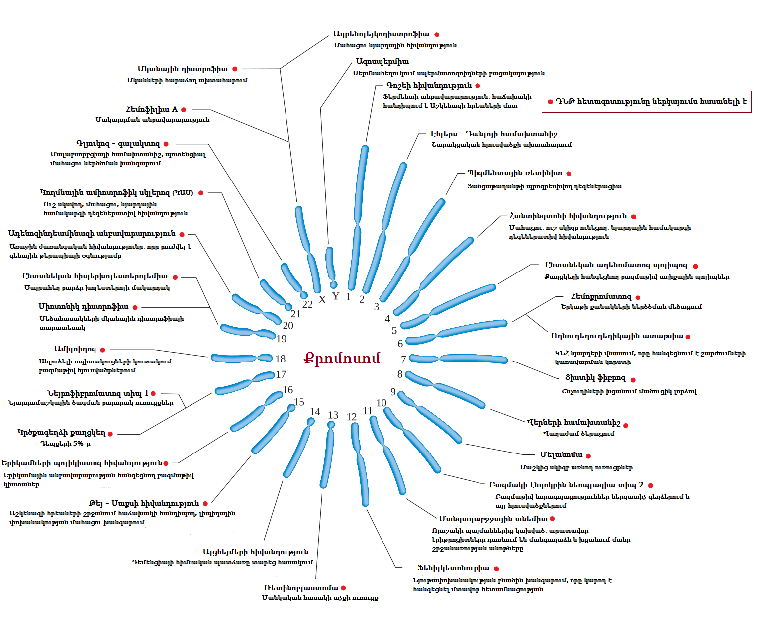 Մարդու քրոմոսոմները և նրանց հետ կապված գենետիկ հիվանդությունները